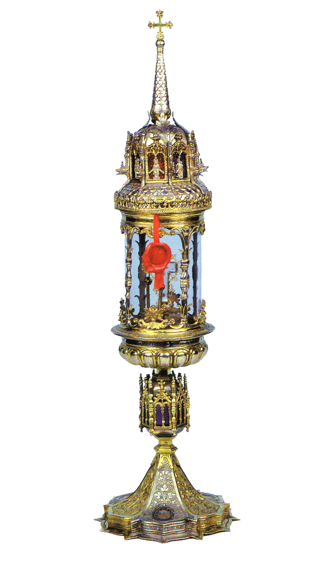 Reliquiario delle Sante Spine